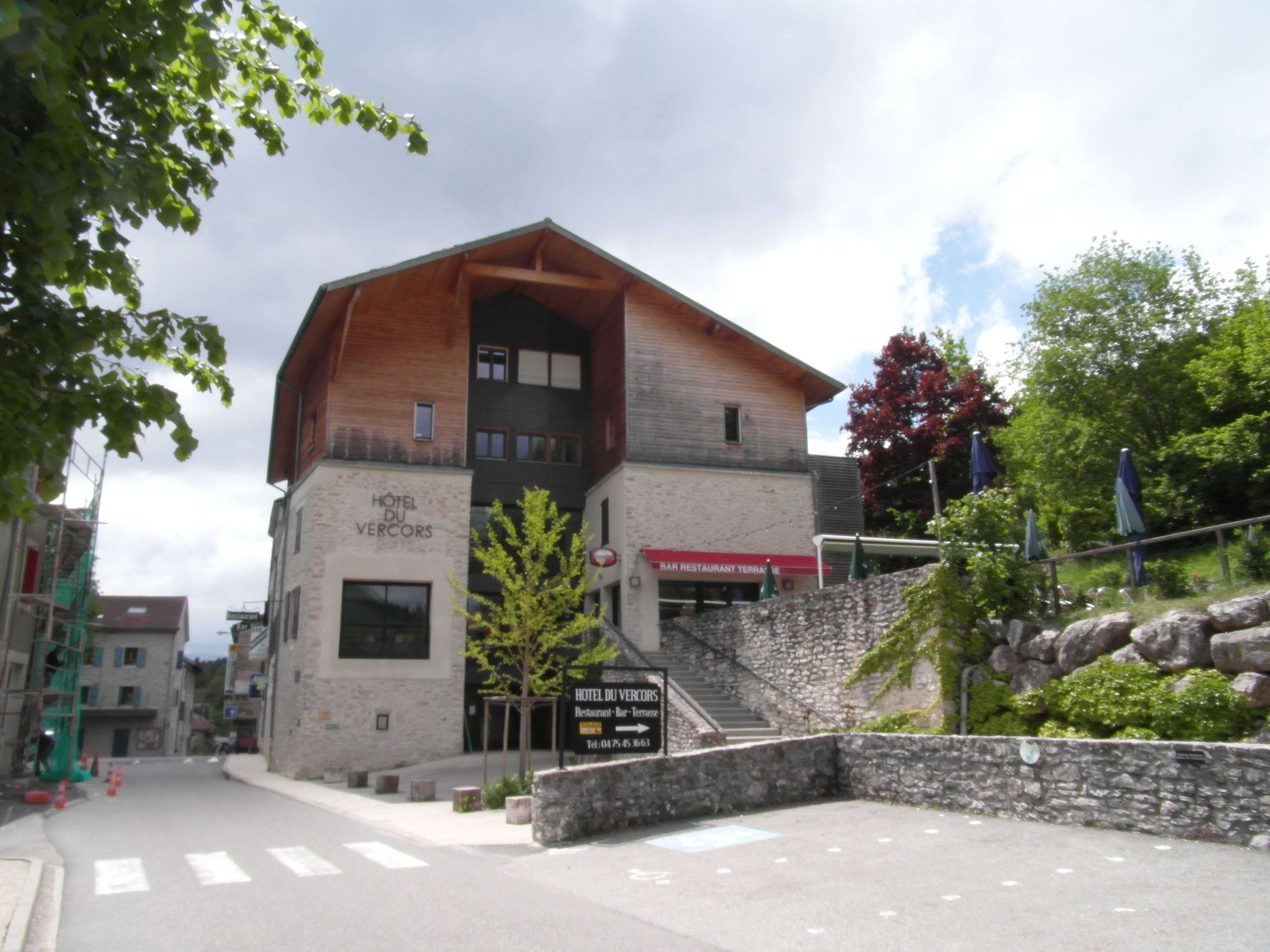 Centre de Saint-Martin-en-Vercors